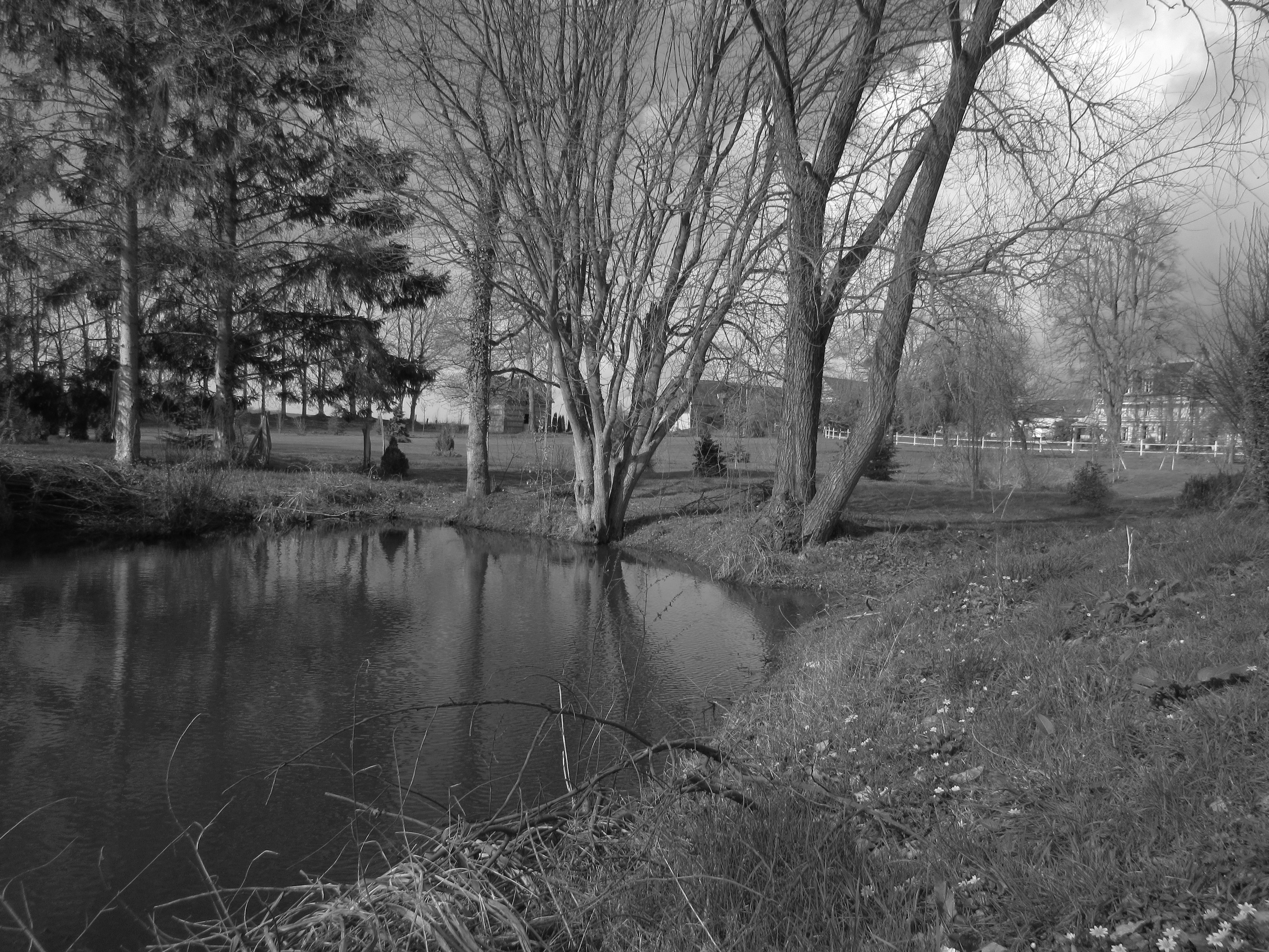 Vue depuis la Mare du Manoir du Clap